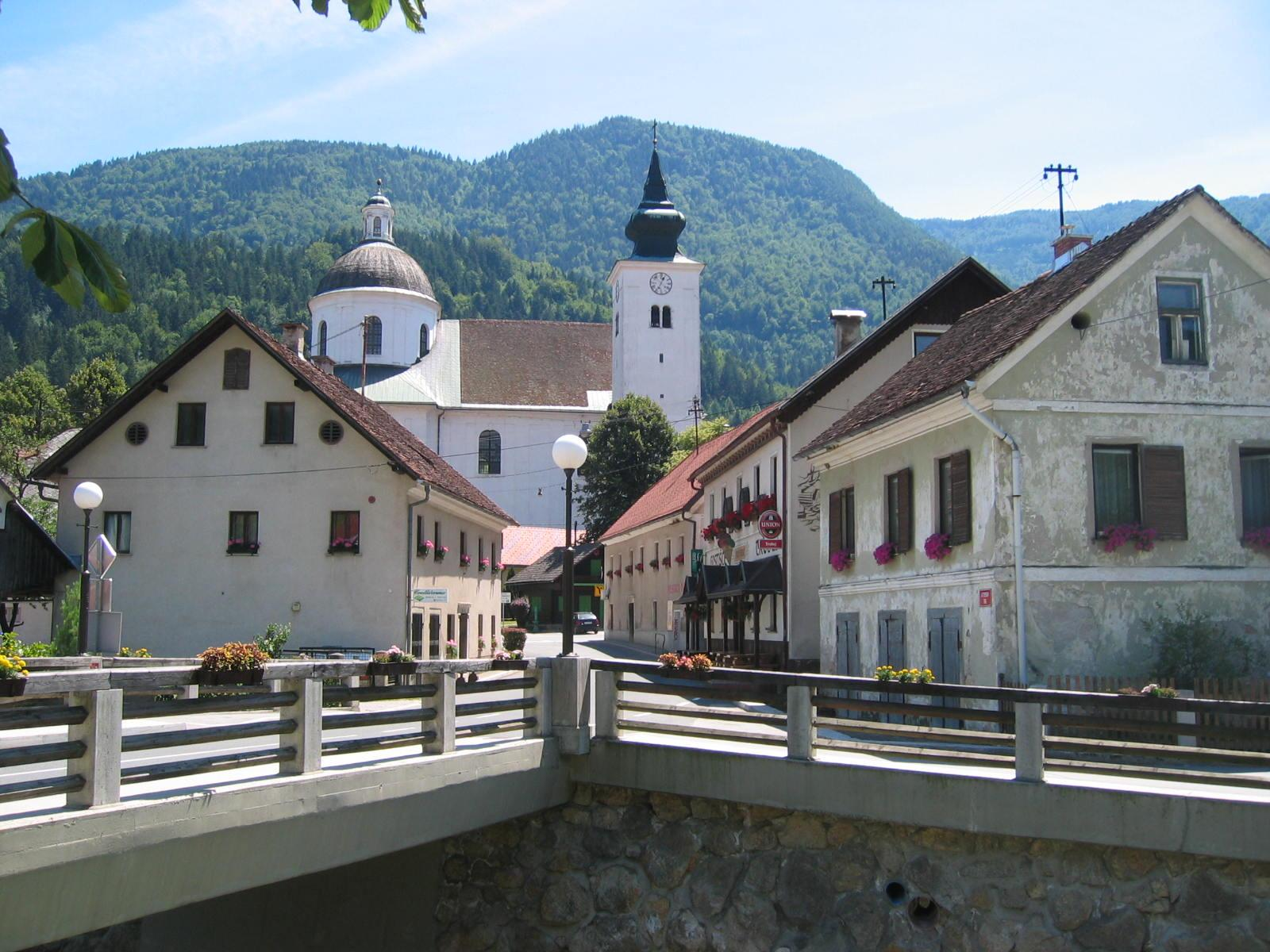 Gornji grad, katedrala sv. Mohorja in Fortunata photo:Ziga 07:11, 23 August 2006 (UTC)